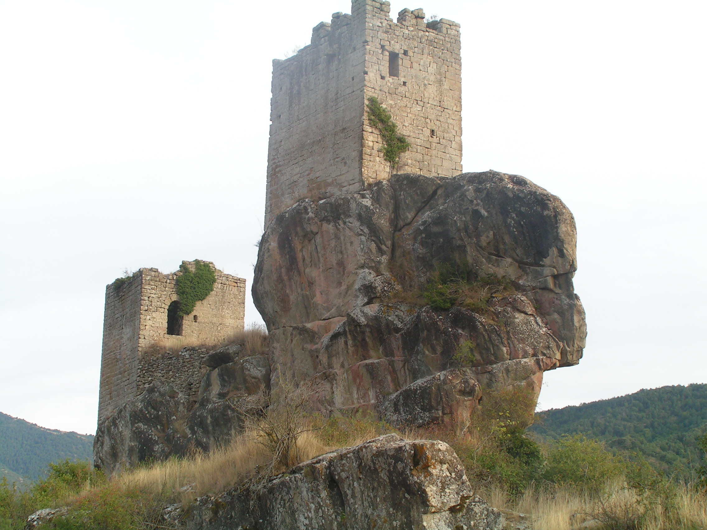 Aragonés: Ambista dende o norte d'o castiello romanico de Sibirana, en Uncastiello (Zinco Billas, Aragón).